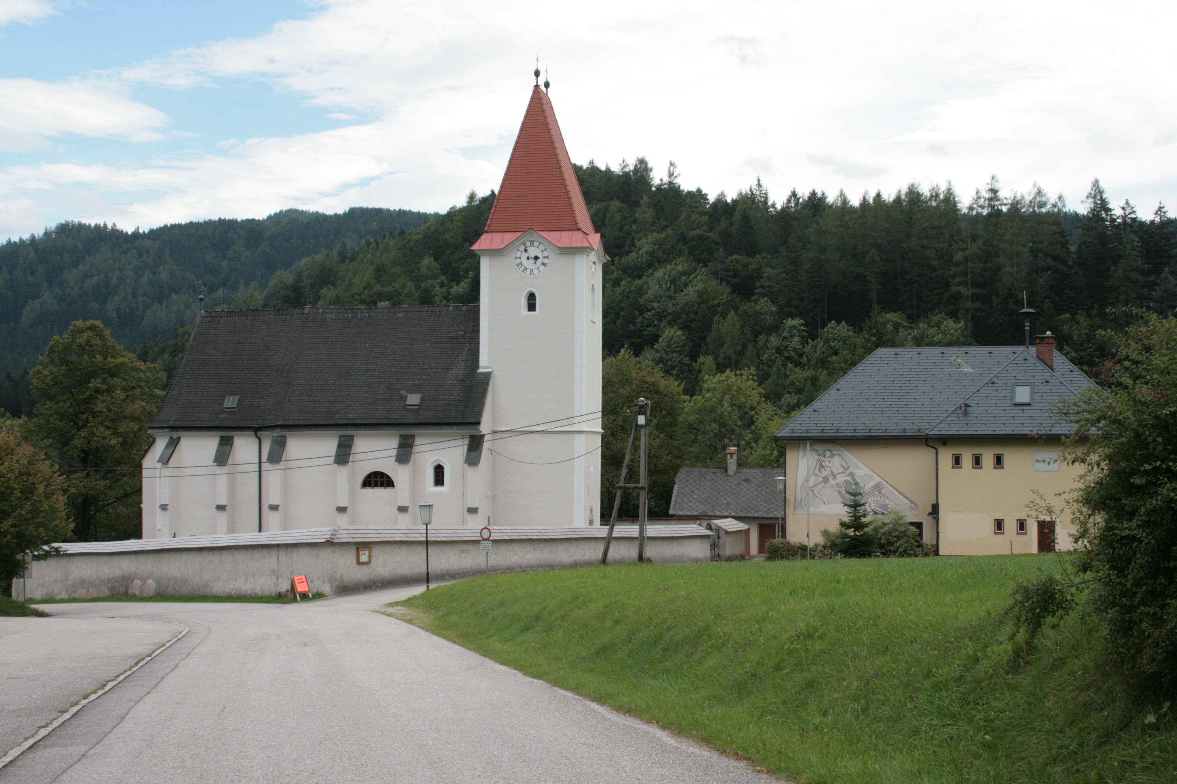 St. Georgen am Reith, Niederösterreich, Austria Kirche und Volksschule